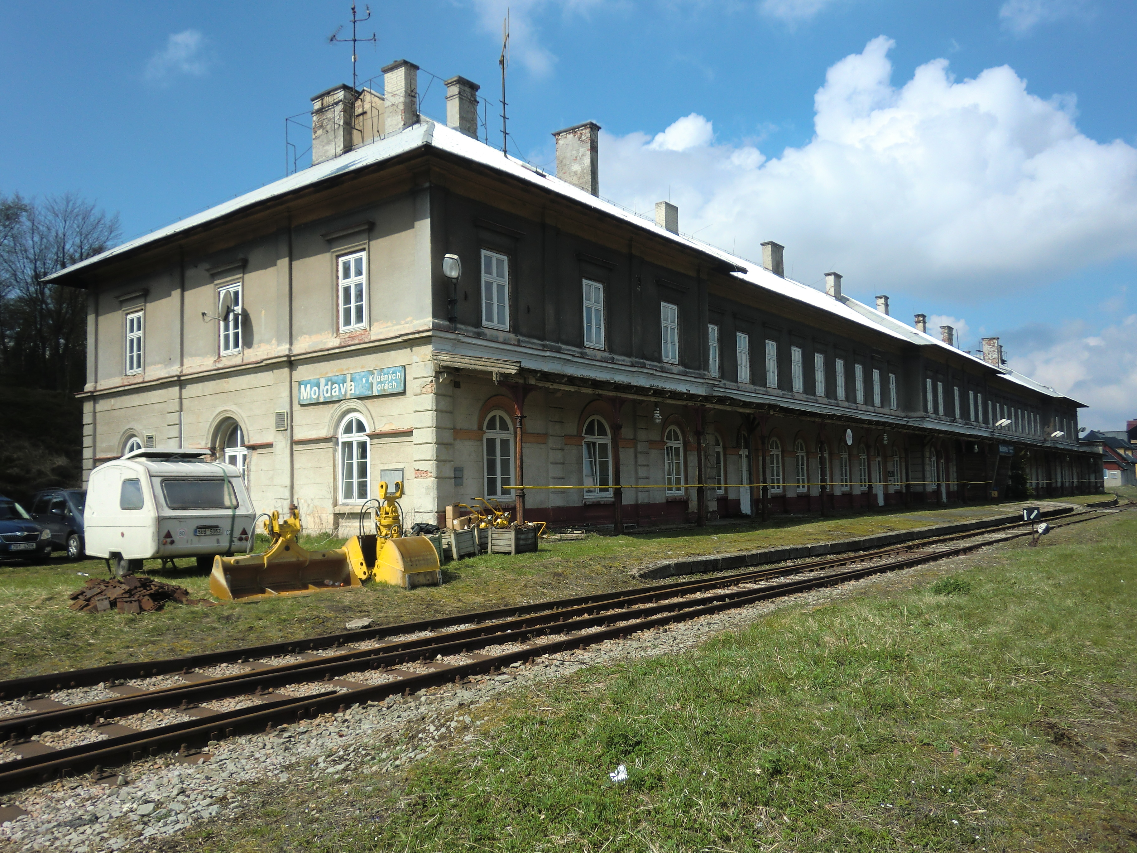 Bahnhofsgebäude Moldau erbaut von Sachsen und Österreich 1884, einst Grenzbahnhof zwischen Sachsen und Österreich bis 1919,danach Tschechien